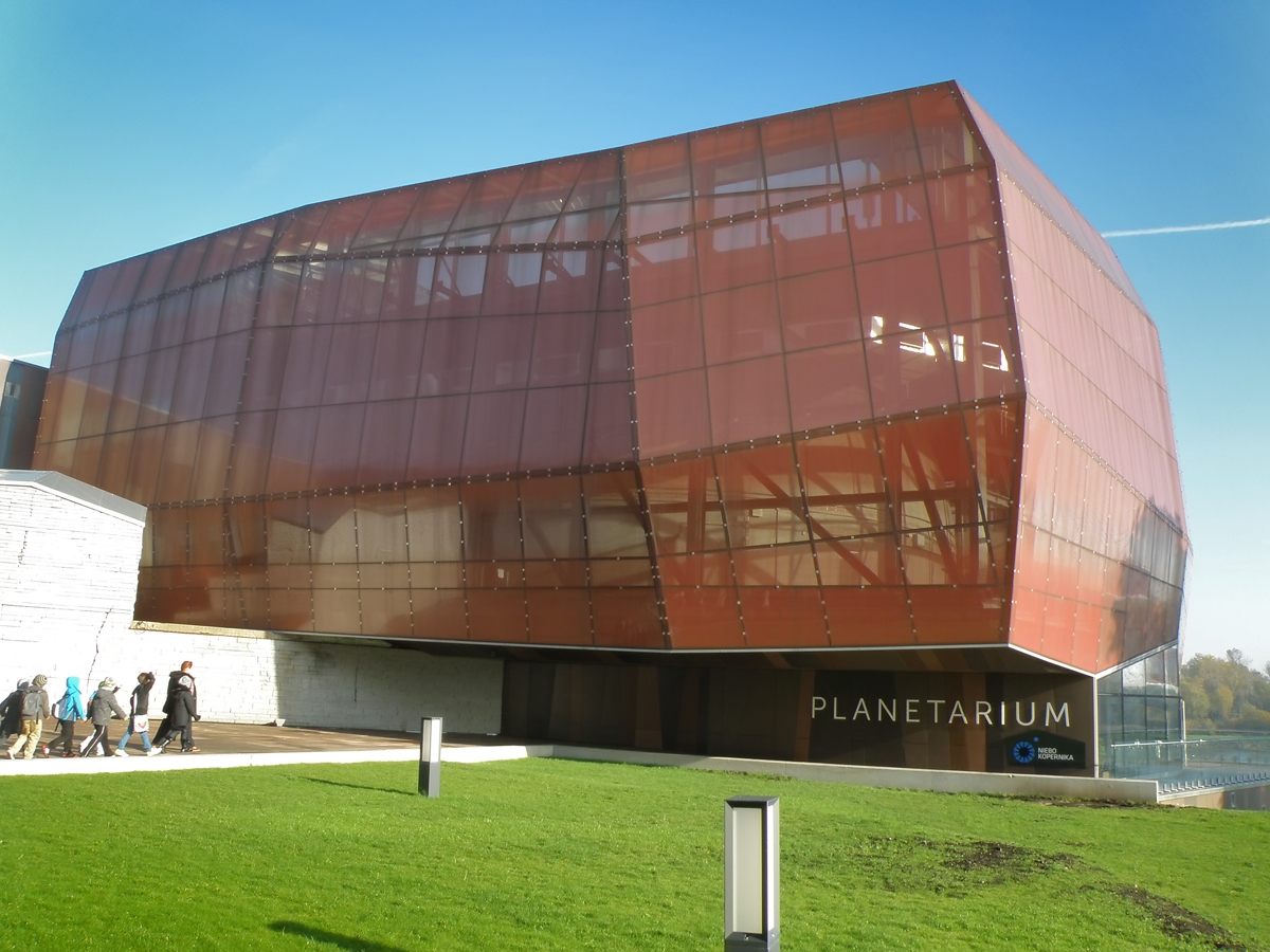 Centrum Nauki Kopernik